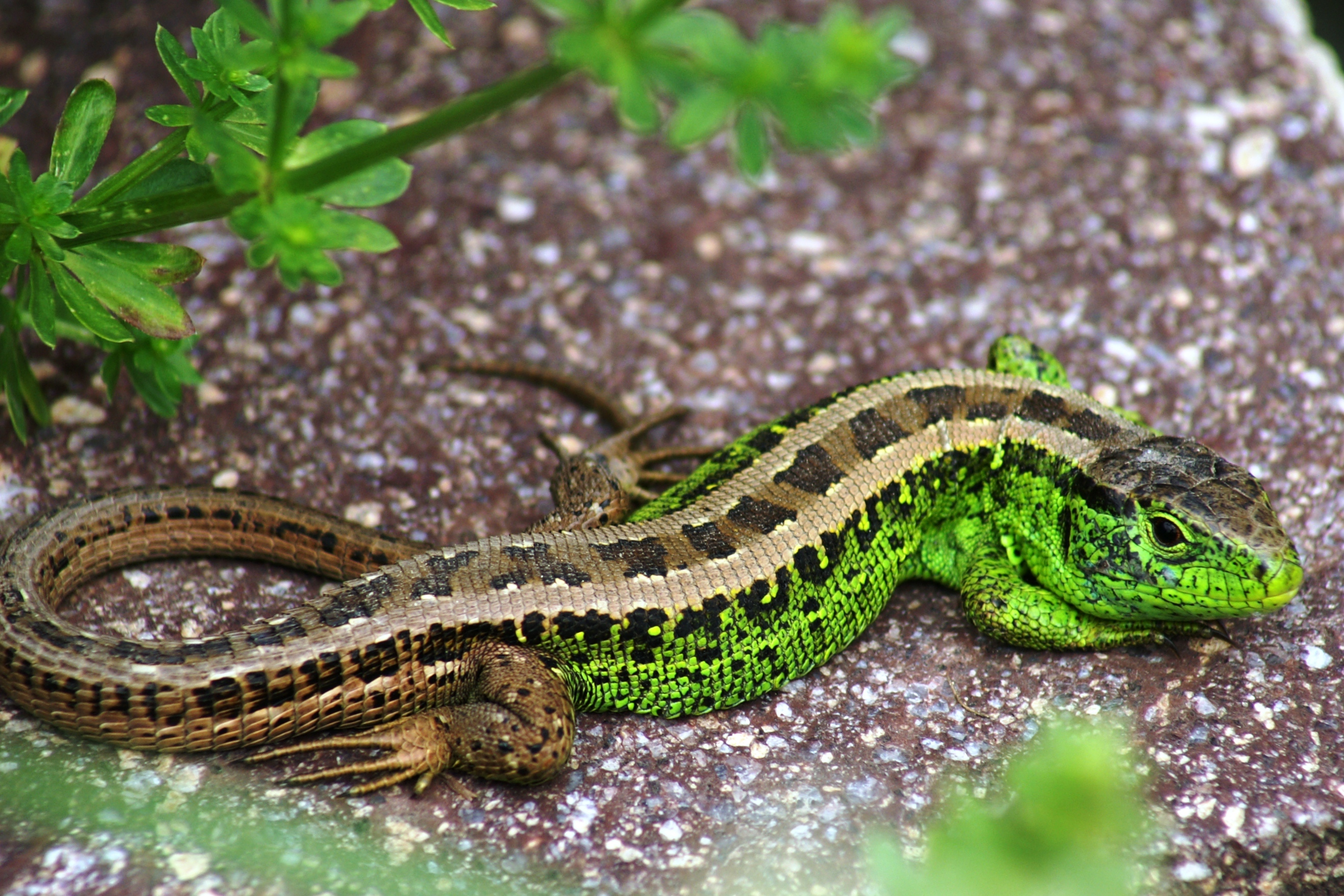 männliche Zauneidechse, (Lacerta agilis)